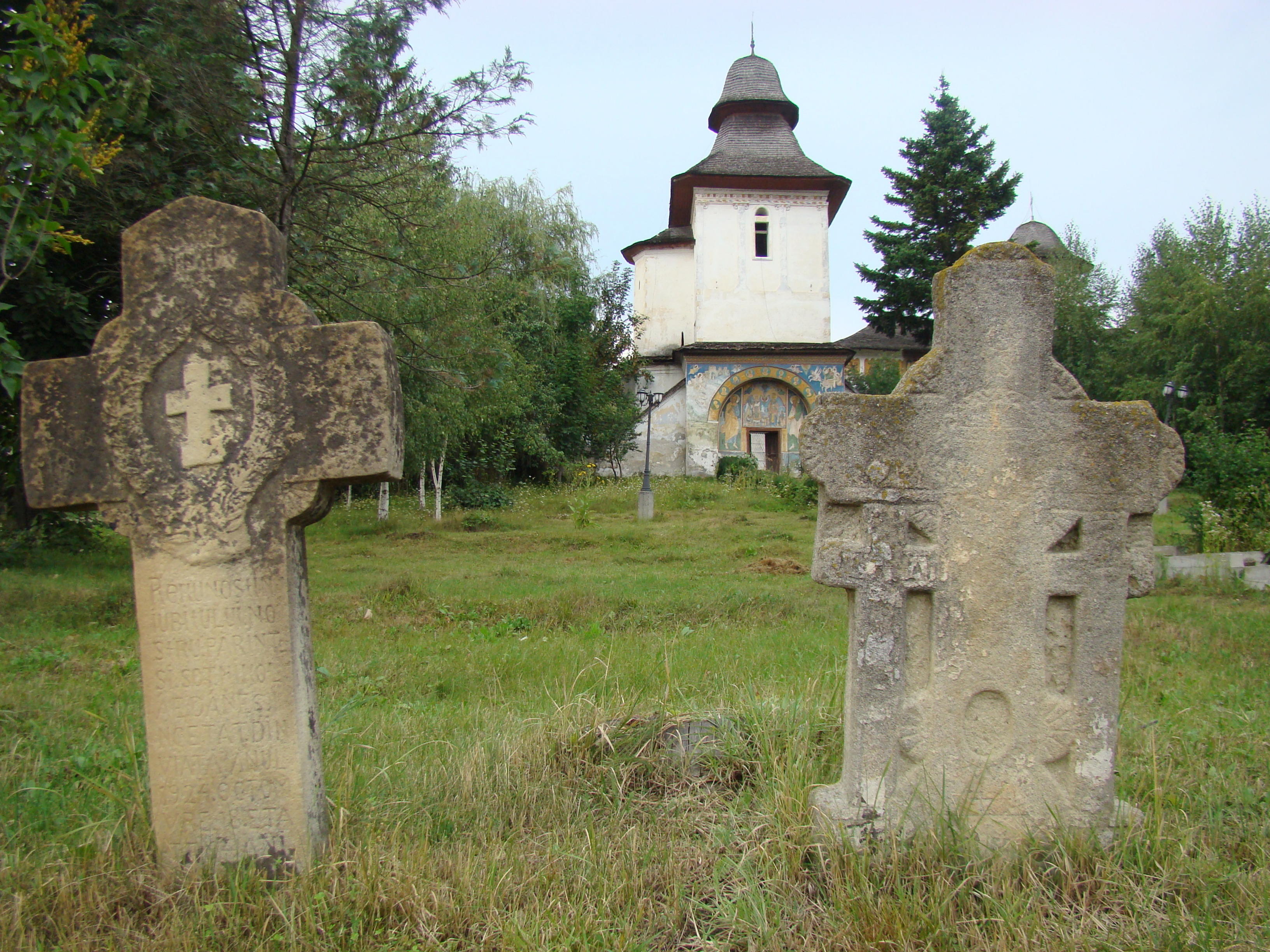 Ansamblul bisericii cu hramurile "Sf. Filofteia" și Sf. Nicolae", sat Valea Danului; comuna Valea Danului, județul Argeș